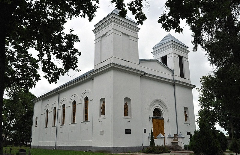 Kobryń - kościół rzymskokatolicki pw. Zaśniecia NMP